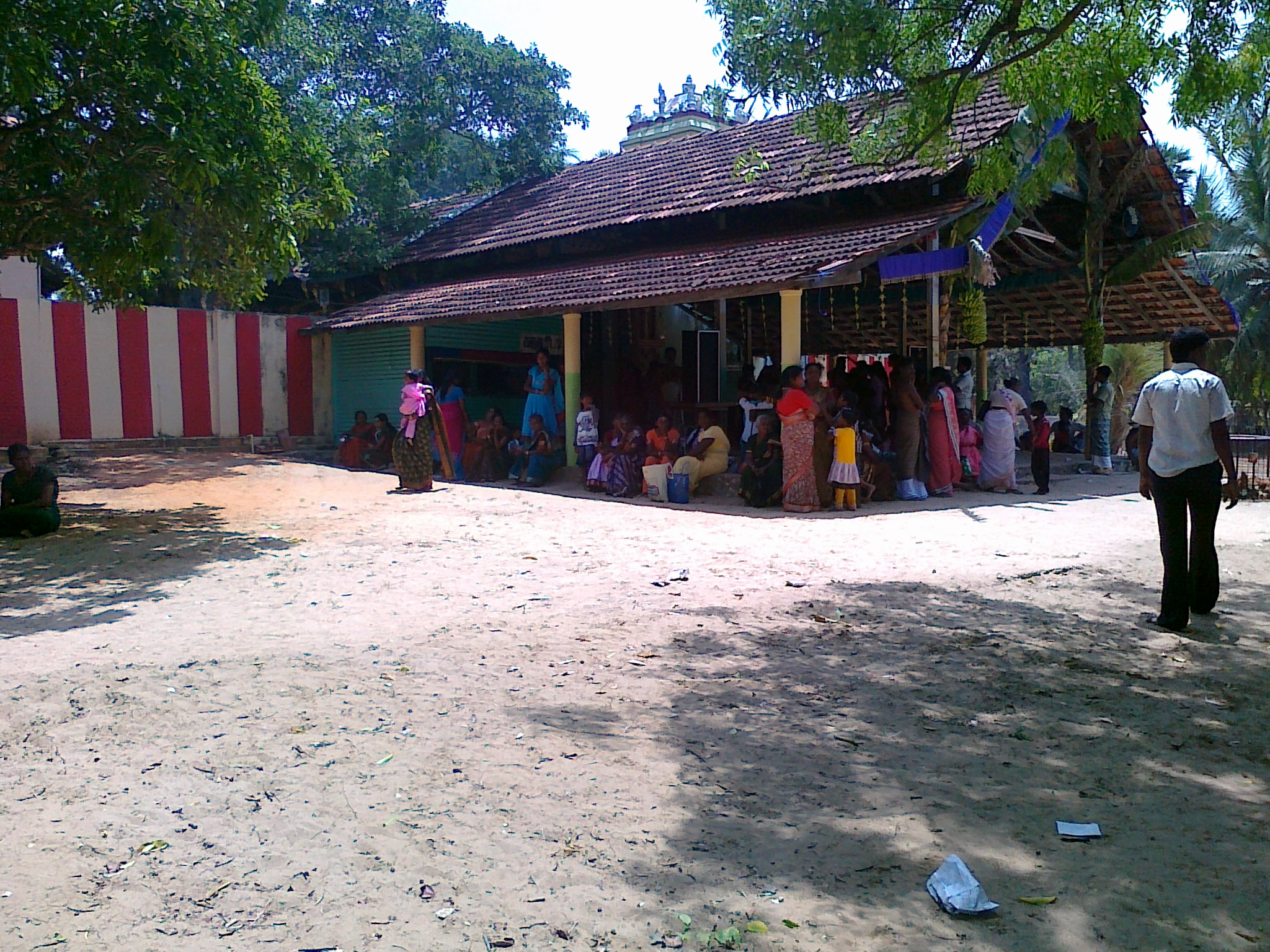 கச்சாய்